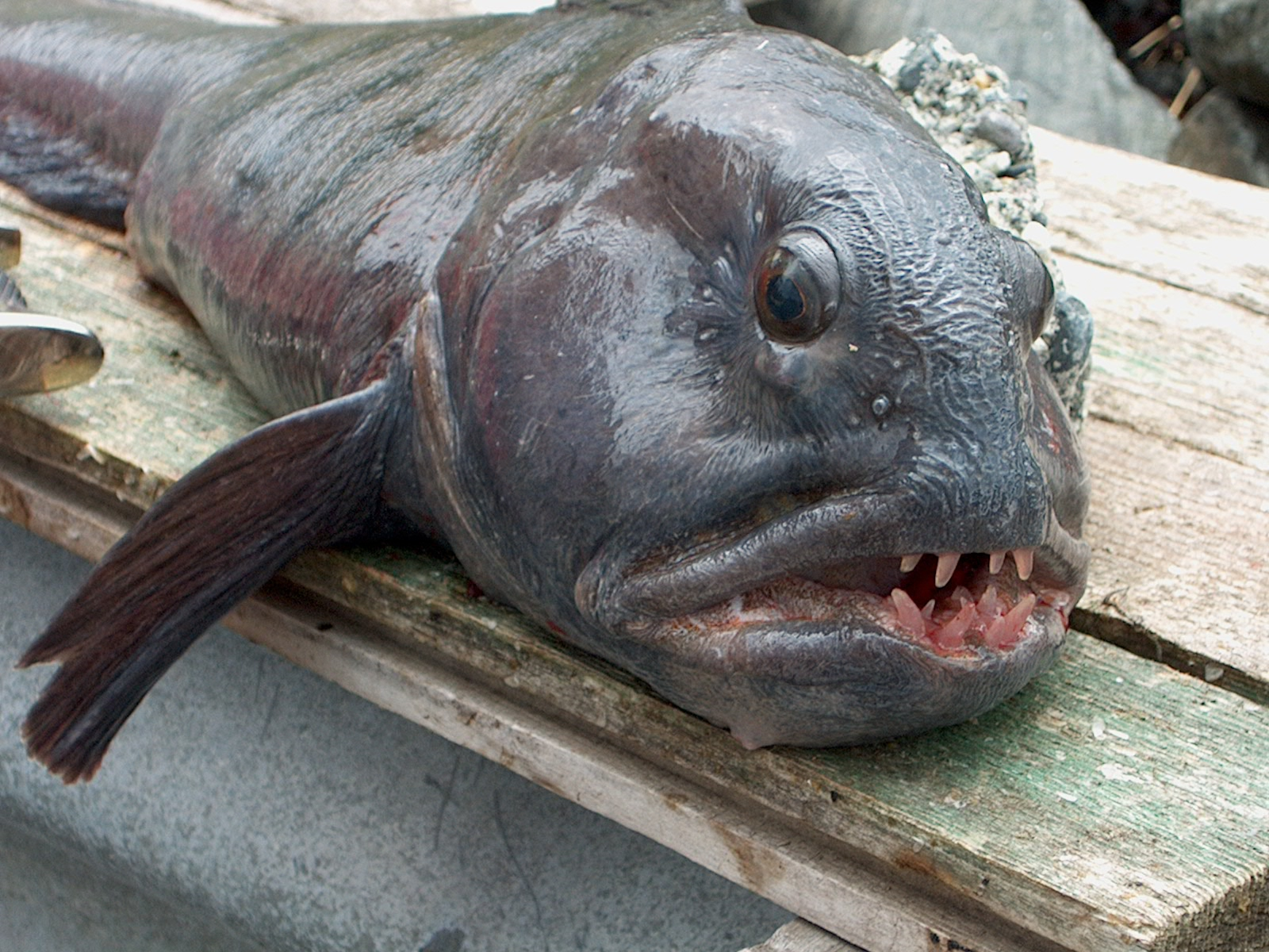 Frisch gefangener Steinbeißer - Altafjord Norwegen